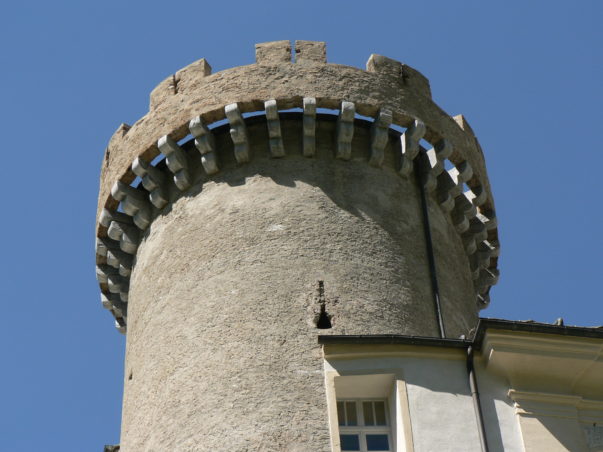 beccatelli in marmo bardiglio sorreggono una merlatura in tufo. Castello di Aymavilles durante l'apertura straordinaria del cantier evento di Châteaux Ouverts (dal 4 al 26 agosto 2018). Aymavilles, Valle d'Aosta, Italia.